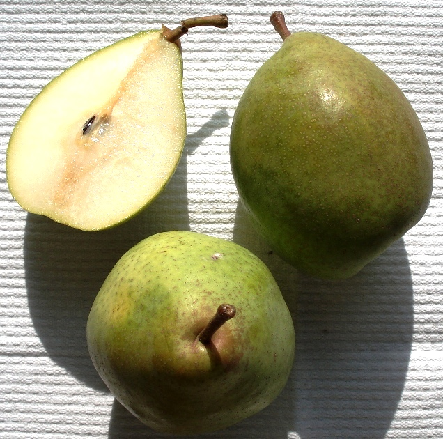 Birne Koestliche aus Charneux